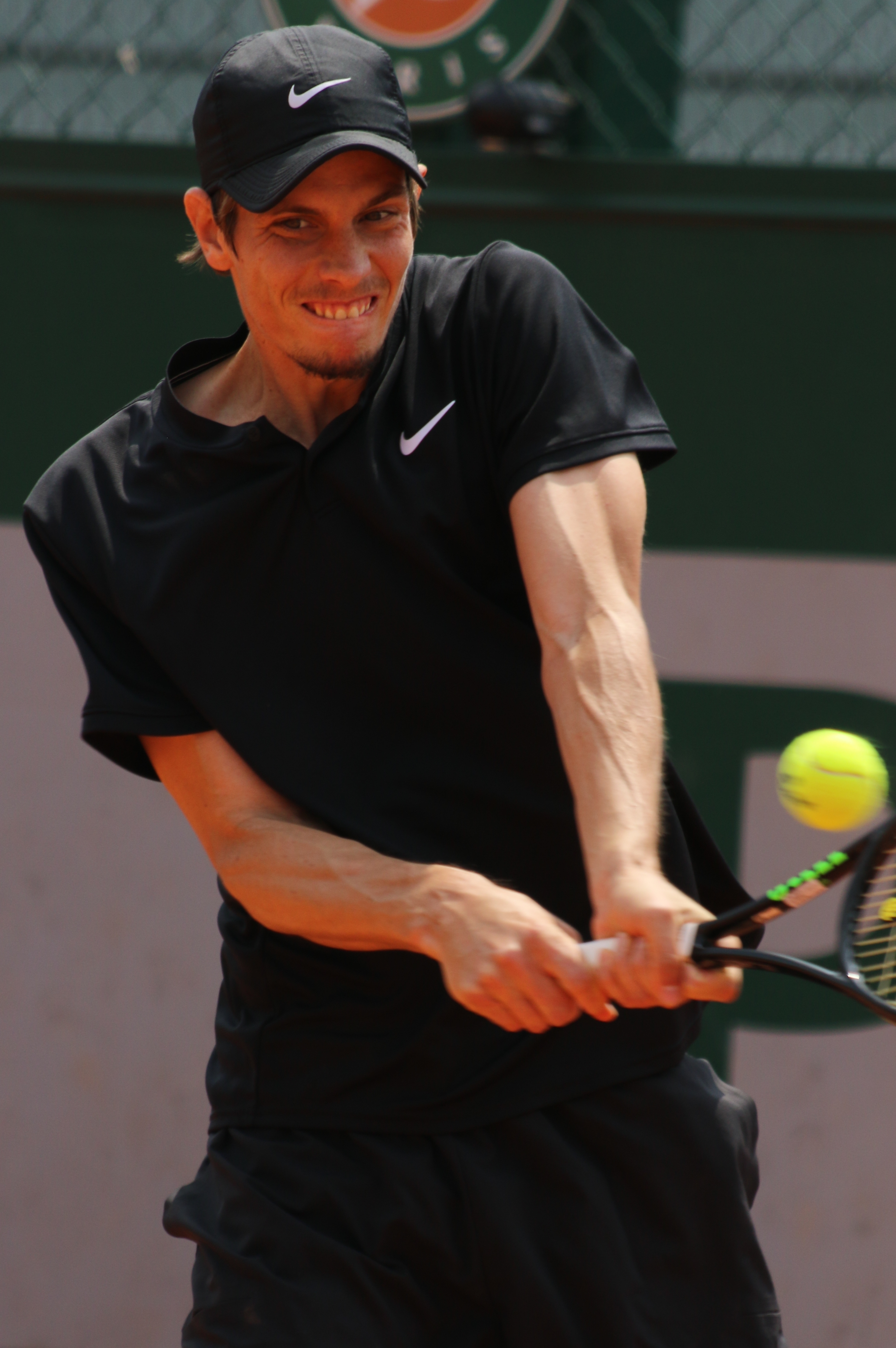 Horansky RGQ19 (13)